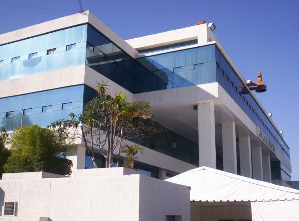 palacio municipal, Naucalpan